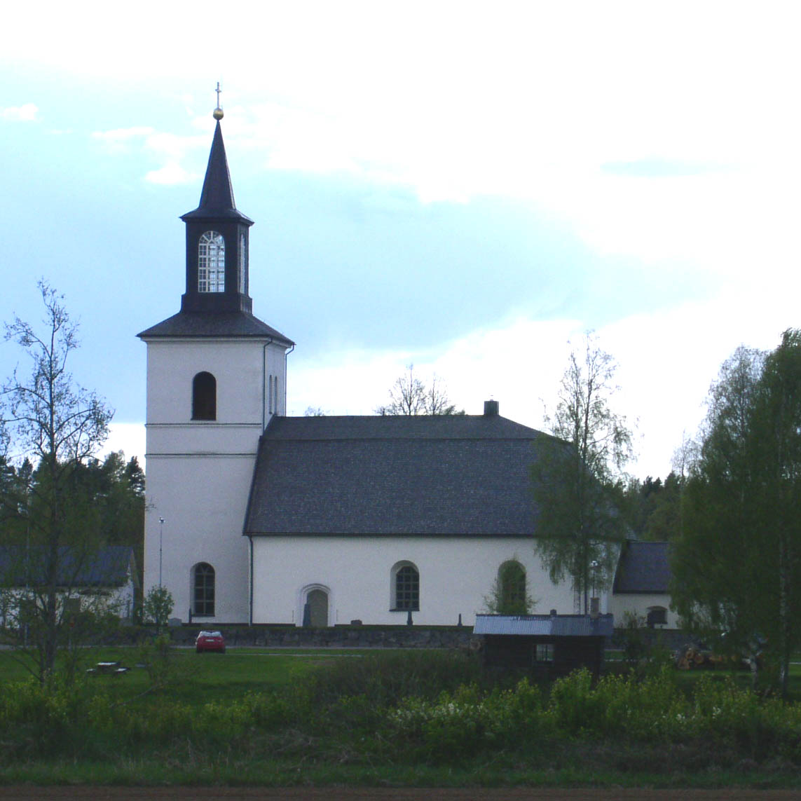 Floda kyrka (Västerås stift), Dalarna. Bilden tagen från söder